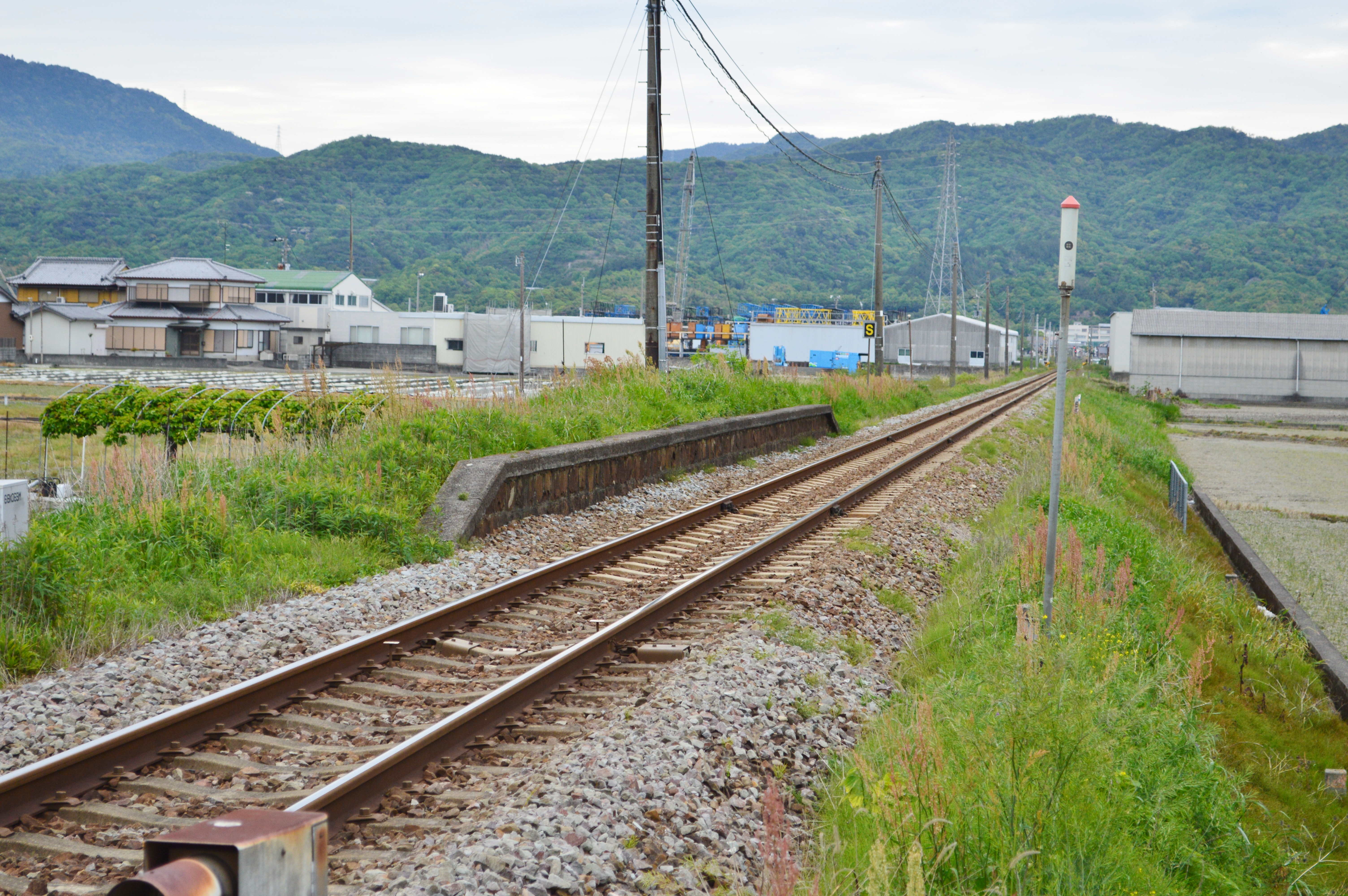 阿波市場駅 ホーム跡 Nikon D3200